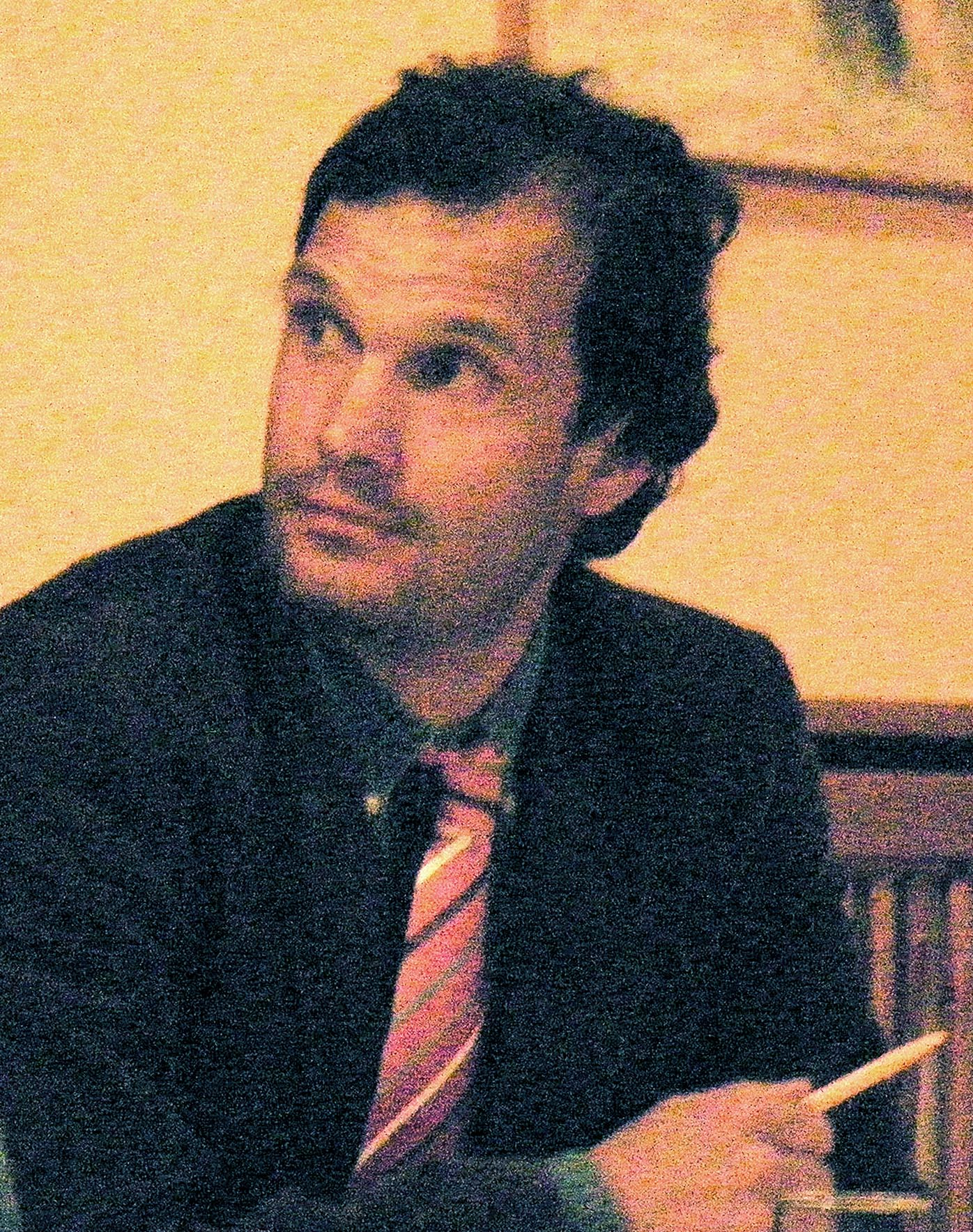 S. Dateiname. Podiumsdiskussion im Brigittenauerstadl.